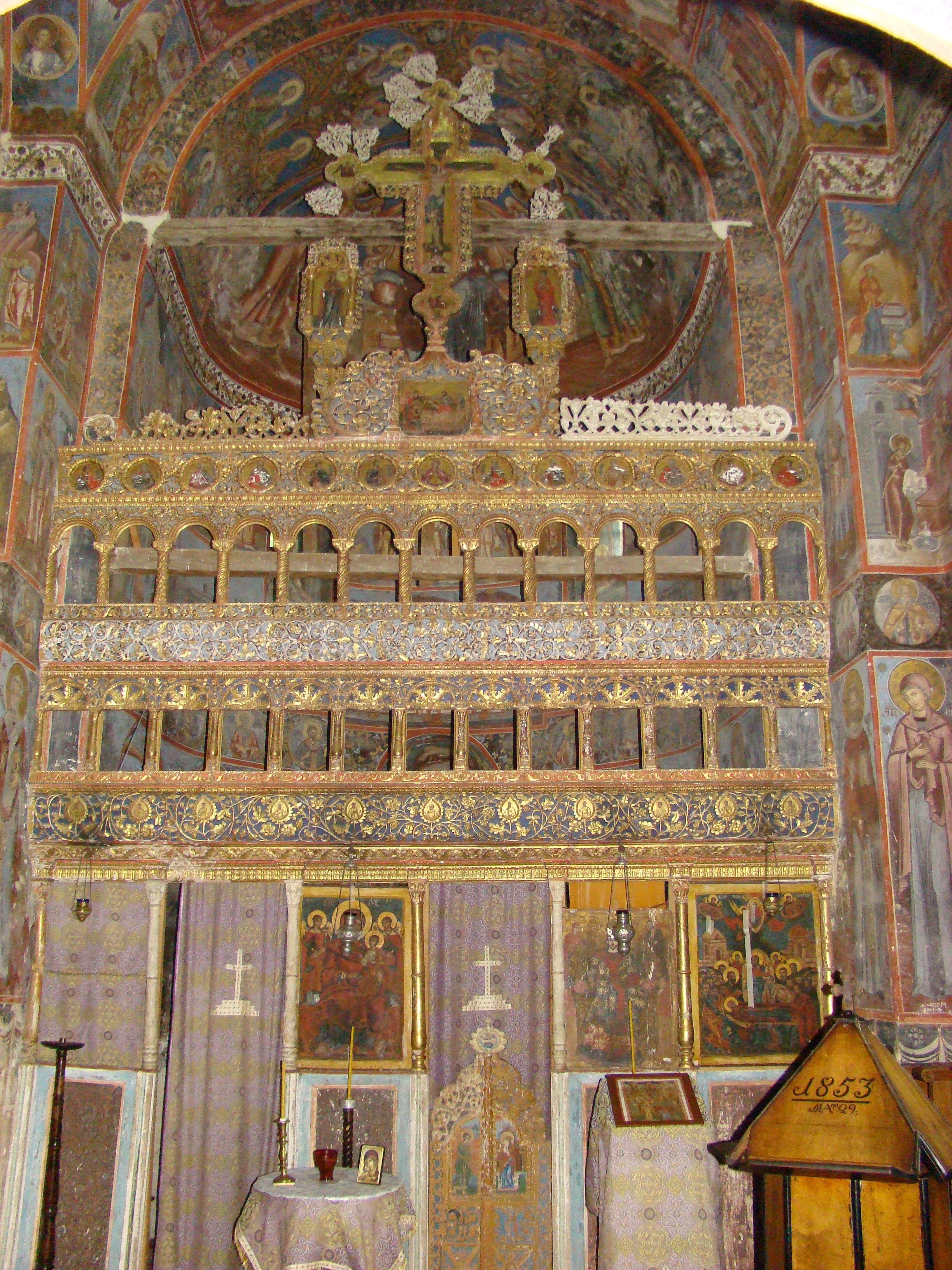 Mănăstirea Hurezi